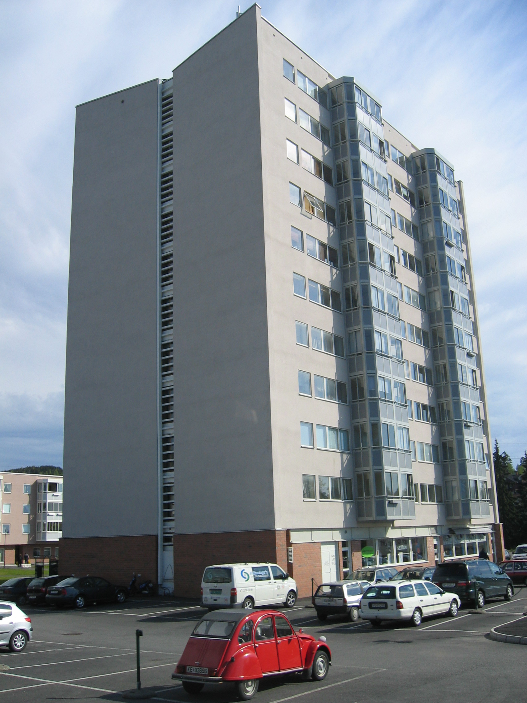 Høyblokka på Løvenstad.